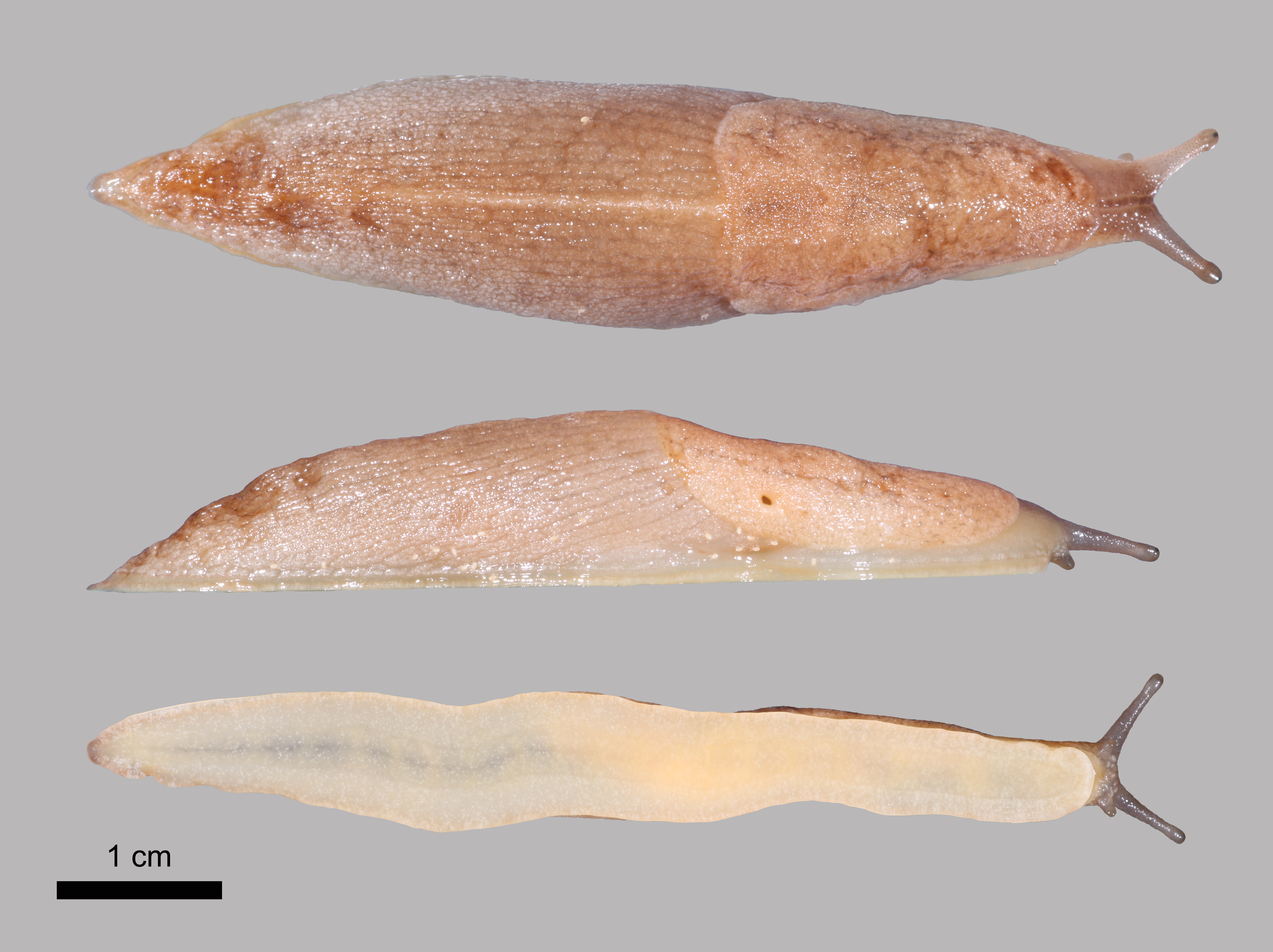 A malaccsiga külső megjelenése három irányból (fotó. Turóci Ágnes)